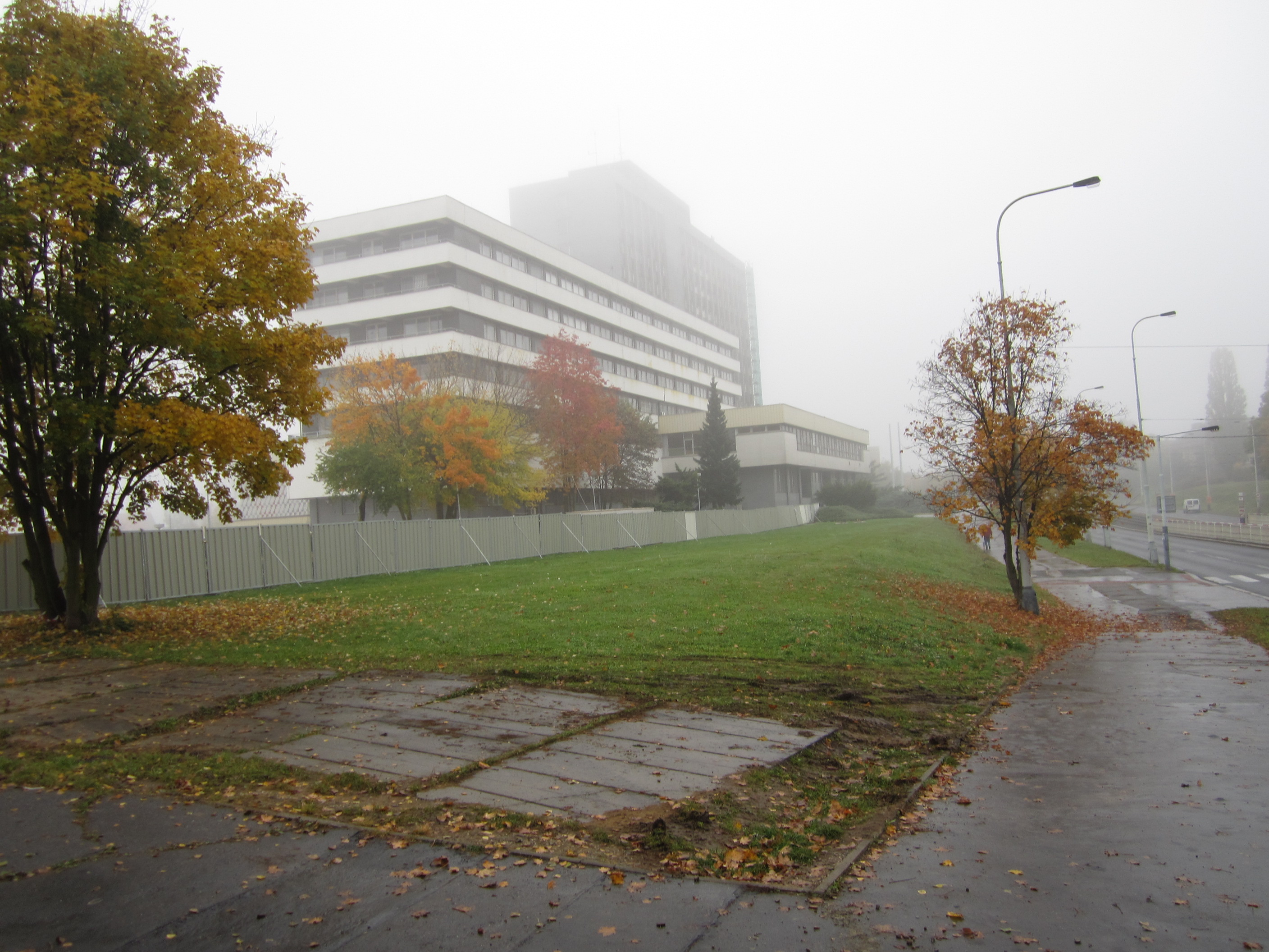 Budova Střelničná 10